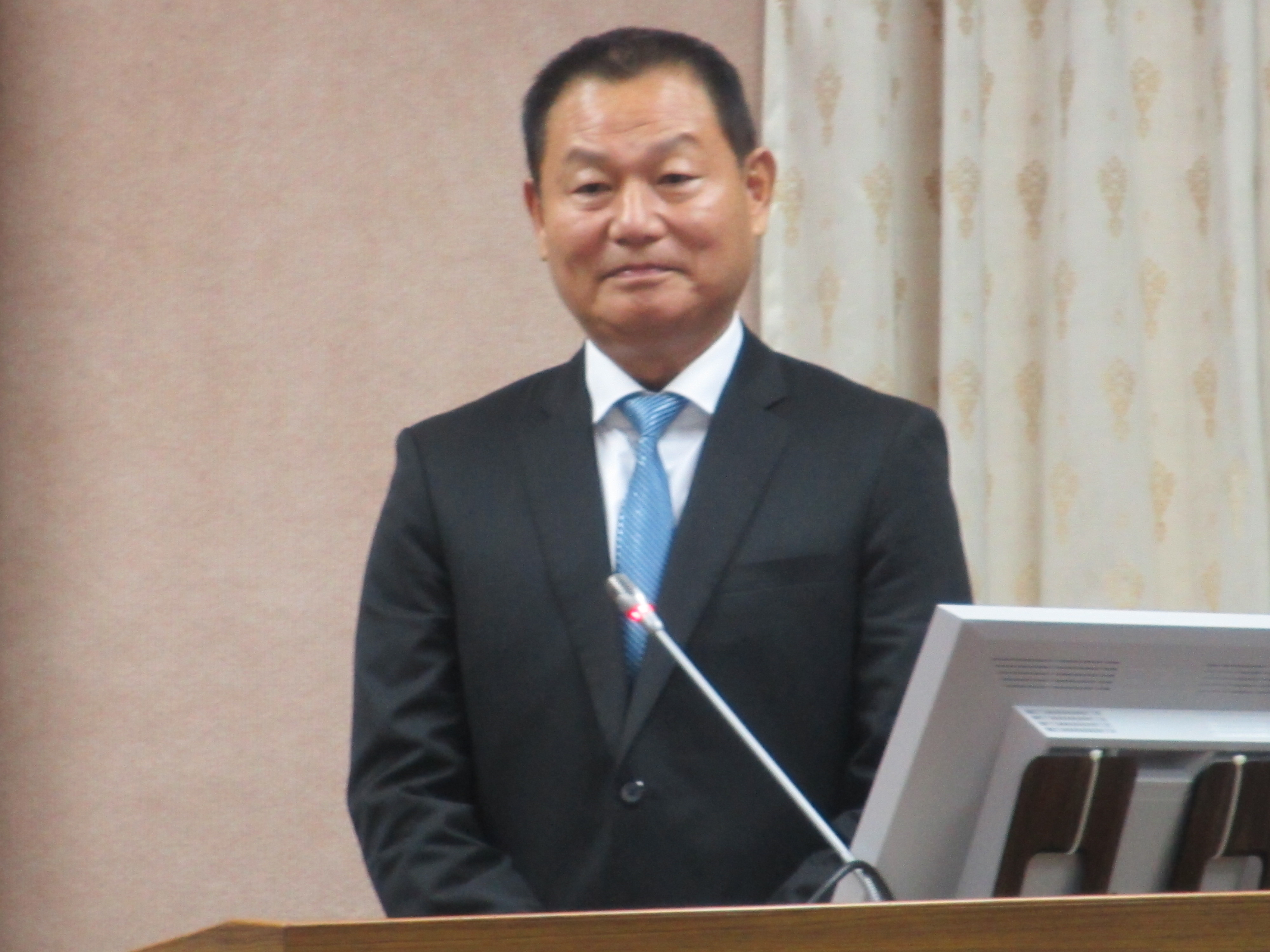 中文（台灣）: 台灣國家安全局長李翔宙(美國之音張永泰拍攝)